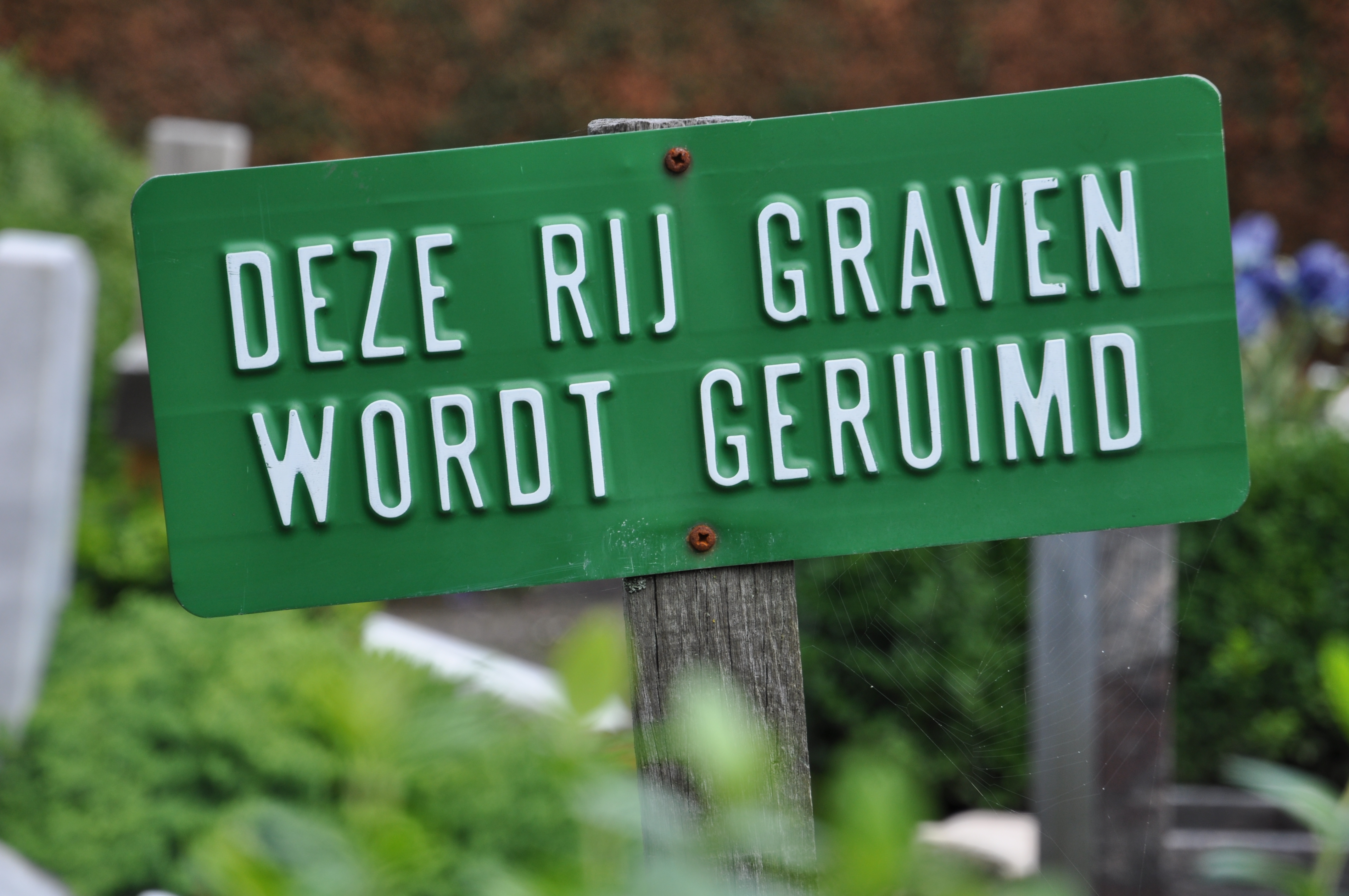 Rooms-Katholieke Begraafplaats Gouda.